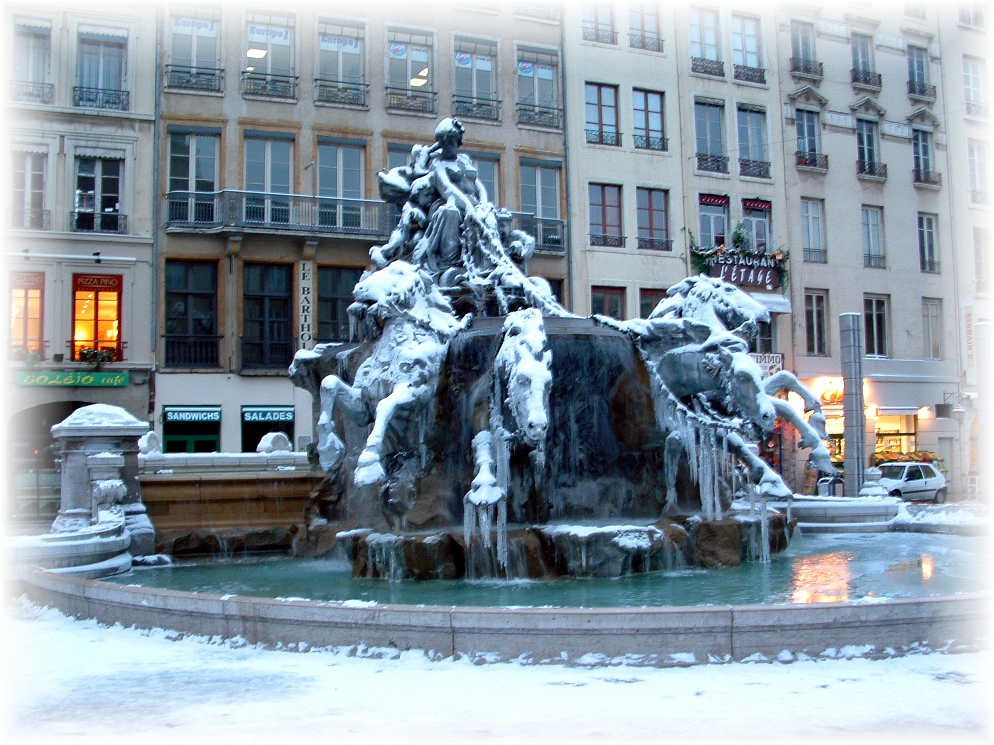 Fontaine gelée, Place des Terreaux à Lyon